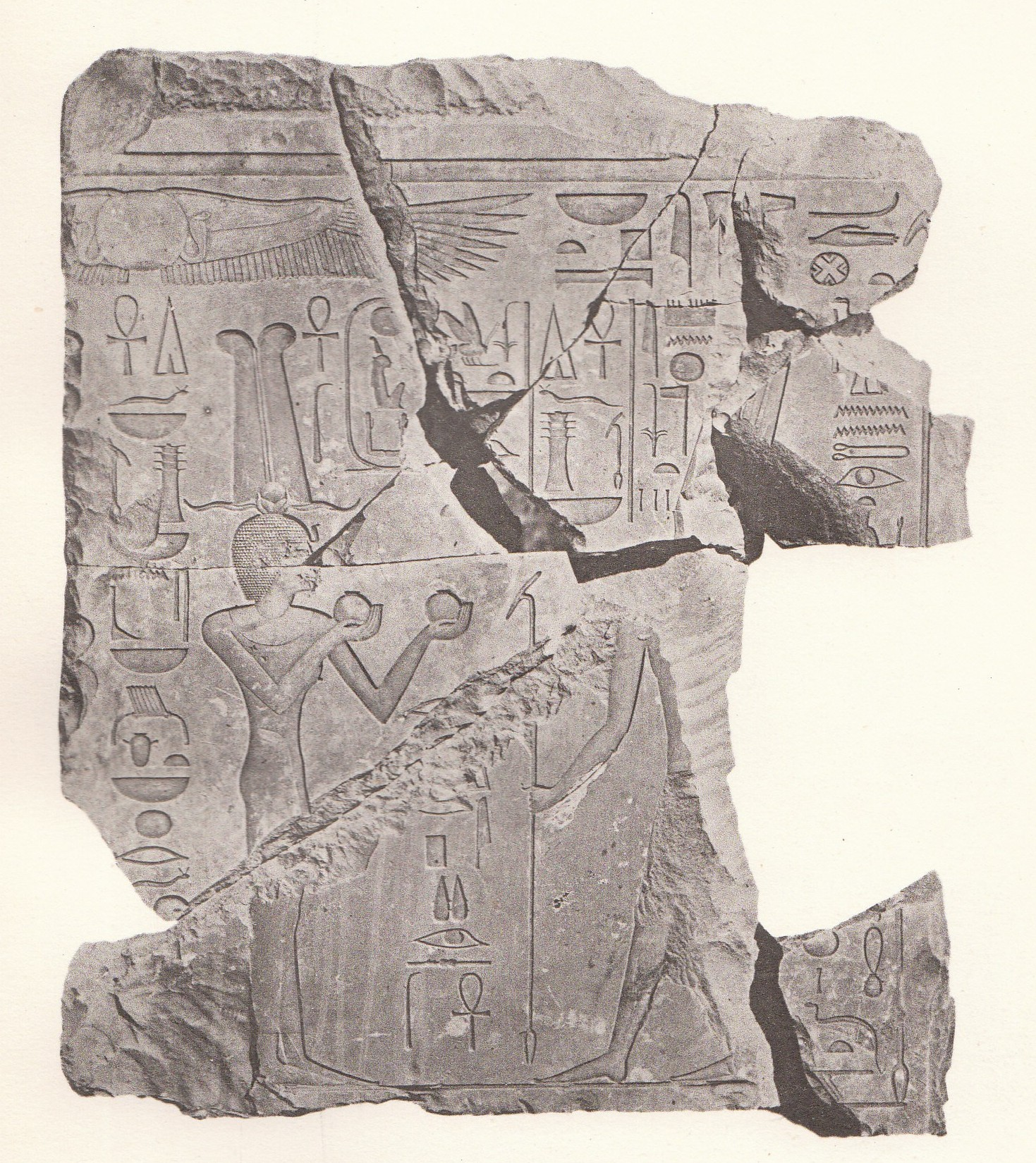 Türsturz aus Kalkstein der zu einem Bau der Königin Hatschepsut im Karnak-Tempel gehörte. Die Darstellung zeigt Hatschepsut als Frau, allerdings schon mit königlichen Insignien. Von Henri Chevrier 1934 entdeckt.